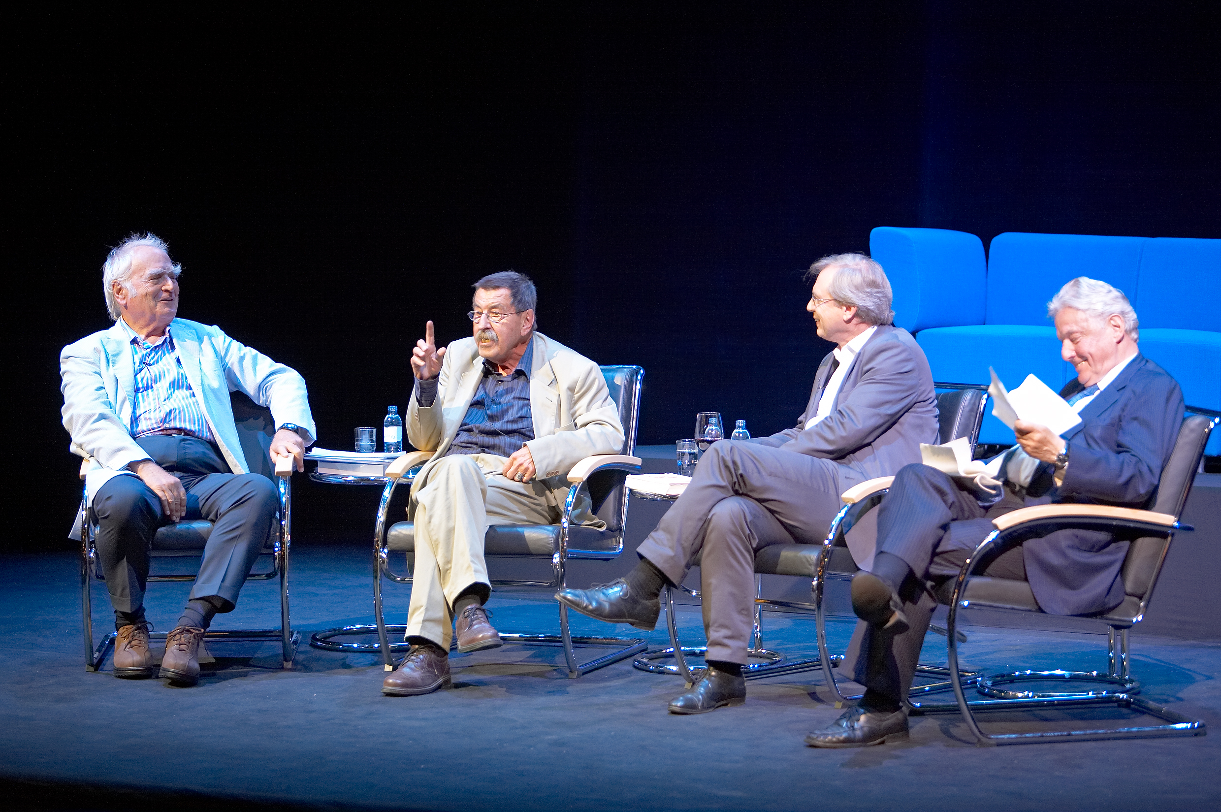 Literarisches Gipfeltreffen: Gruppe 47 – sechzig Jahre danach Günter Grass, Joachim Kaiser und Martin Walser im Gespräch mit Wolfgang Herles 15. Juni 2007, 20 Uhr auf dem Blauen Sofa im Berliner Ensemble